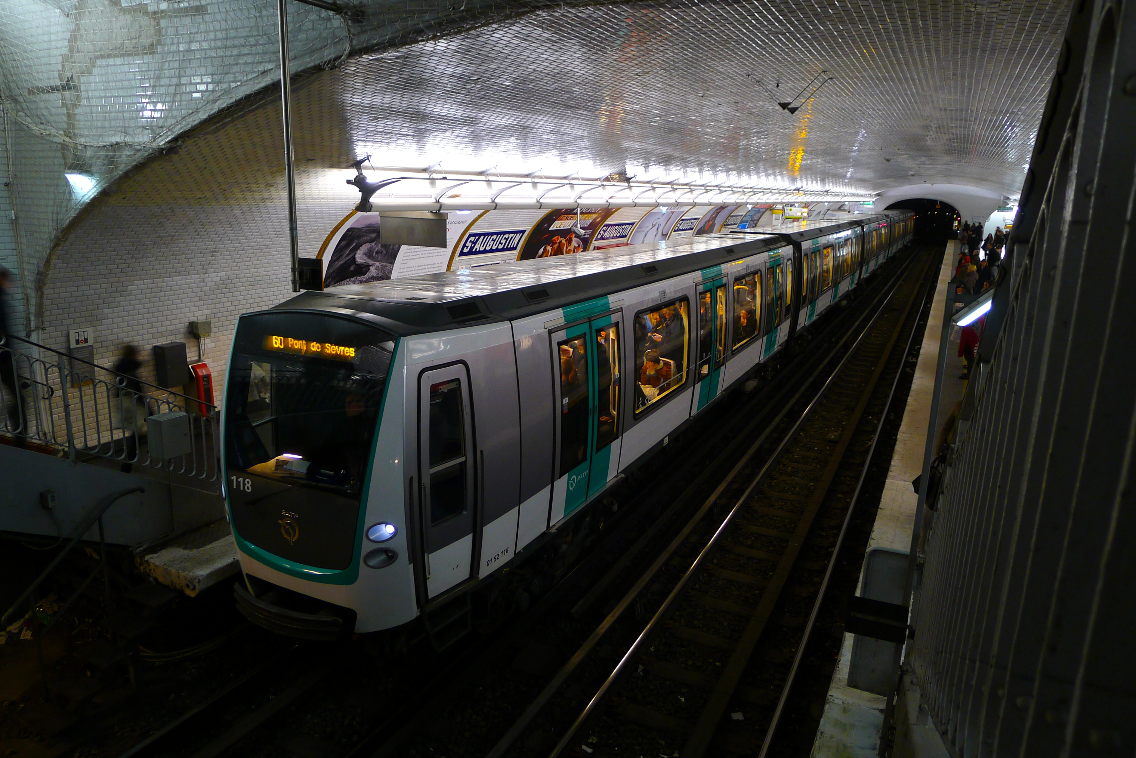 Métro MF 01 n°118 de la Ratp sur la ligne 9 à la station Saint-Augustin.